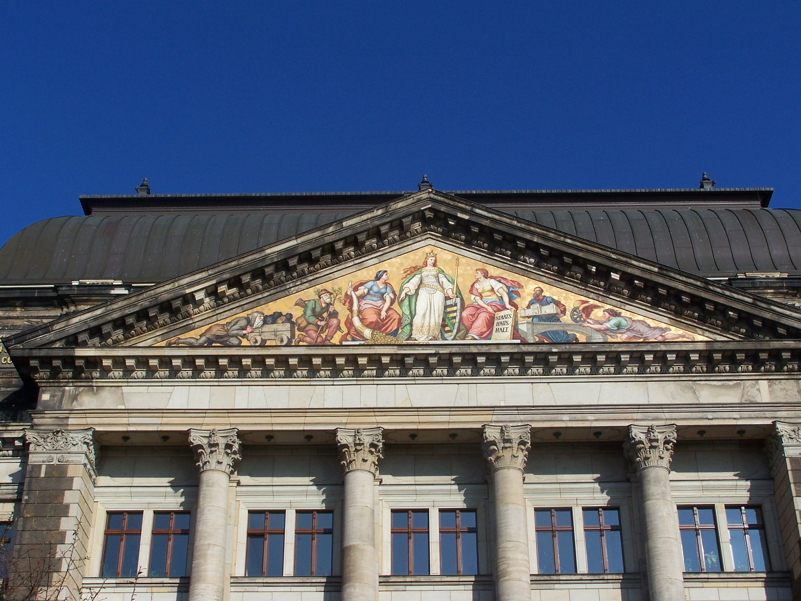 Giebelbild am Sächsischen Finanzministerium: Es zeigt Saxonia (Mitte) beim Geldeinnehmen